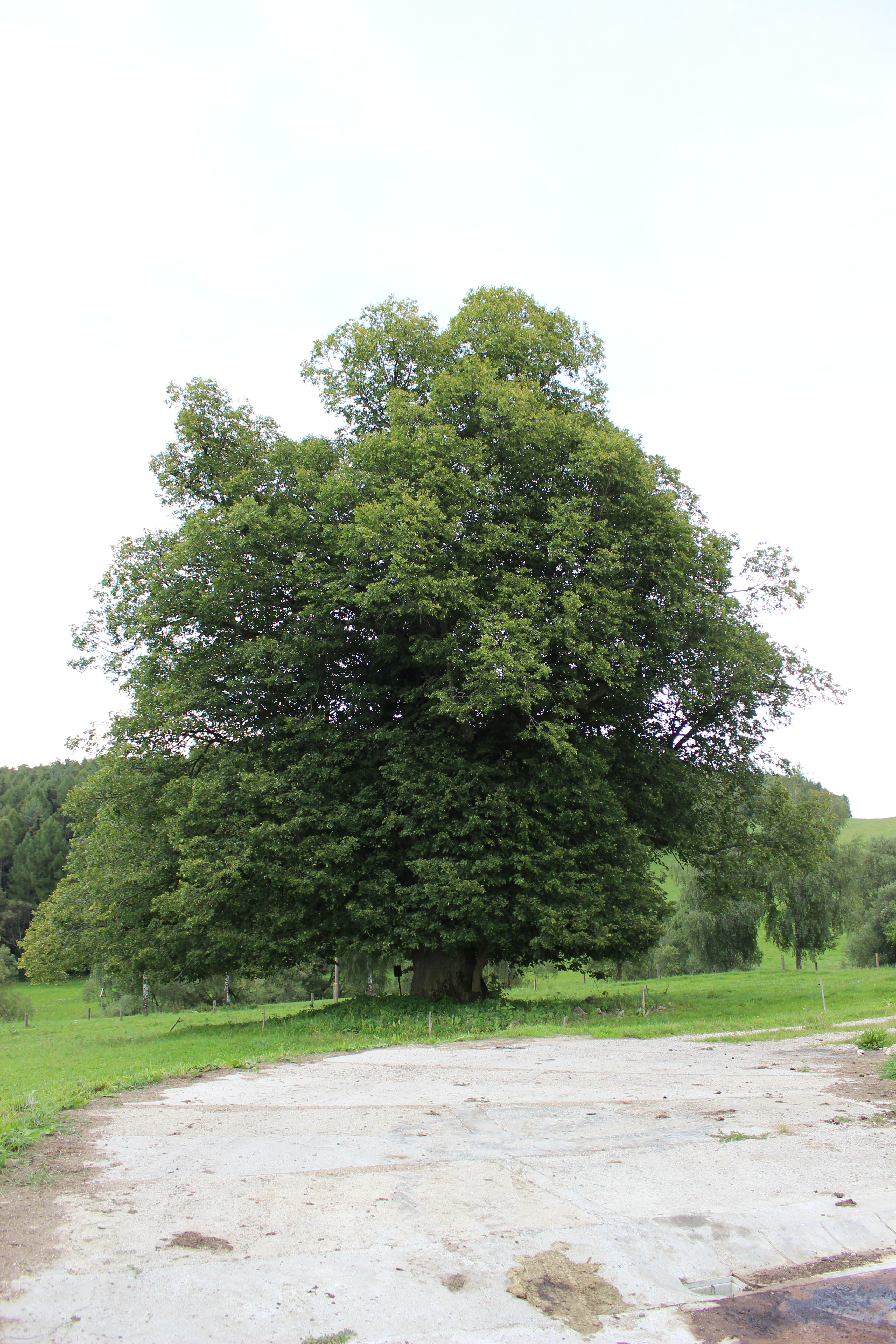 Pamětní strom ve Vlastějově (pohled od západu). Project: Chráněná území.